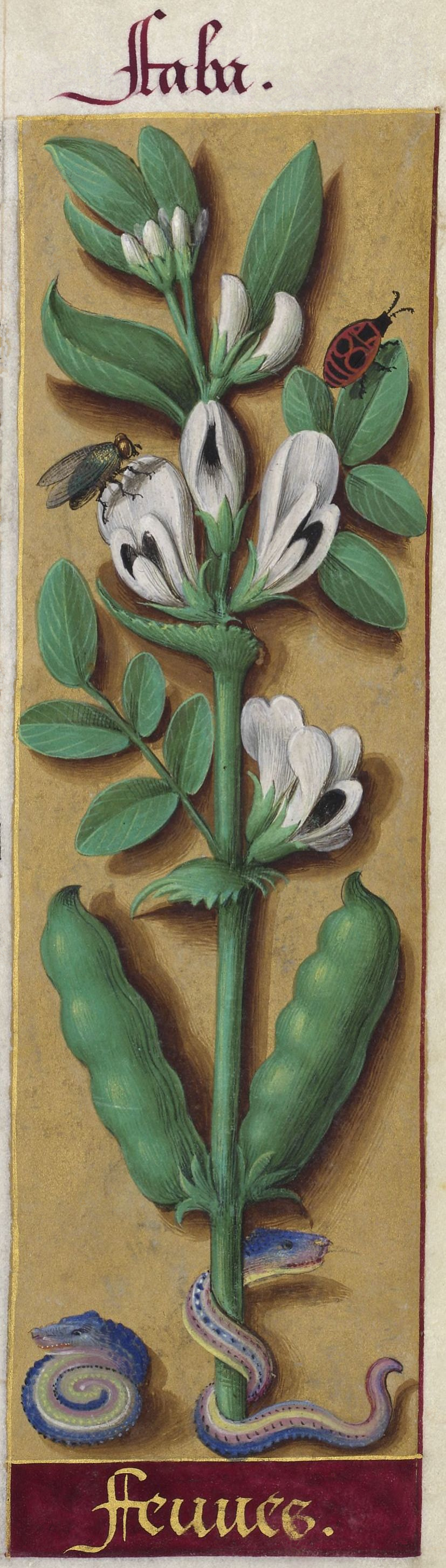 Fèves (Vicia faba) - Horae ad usum Romanum , dites « Grandes Heures d'Anne de Bretagne ».